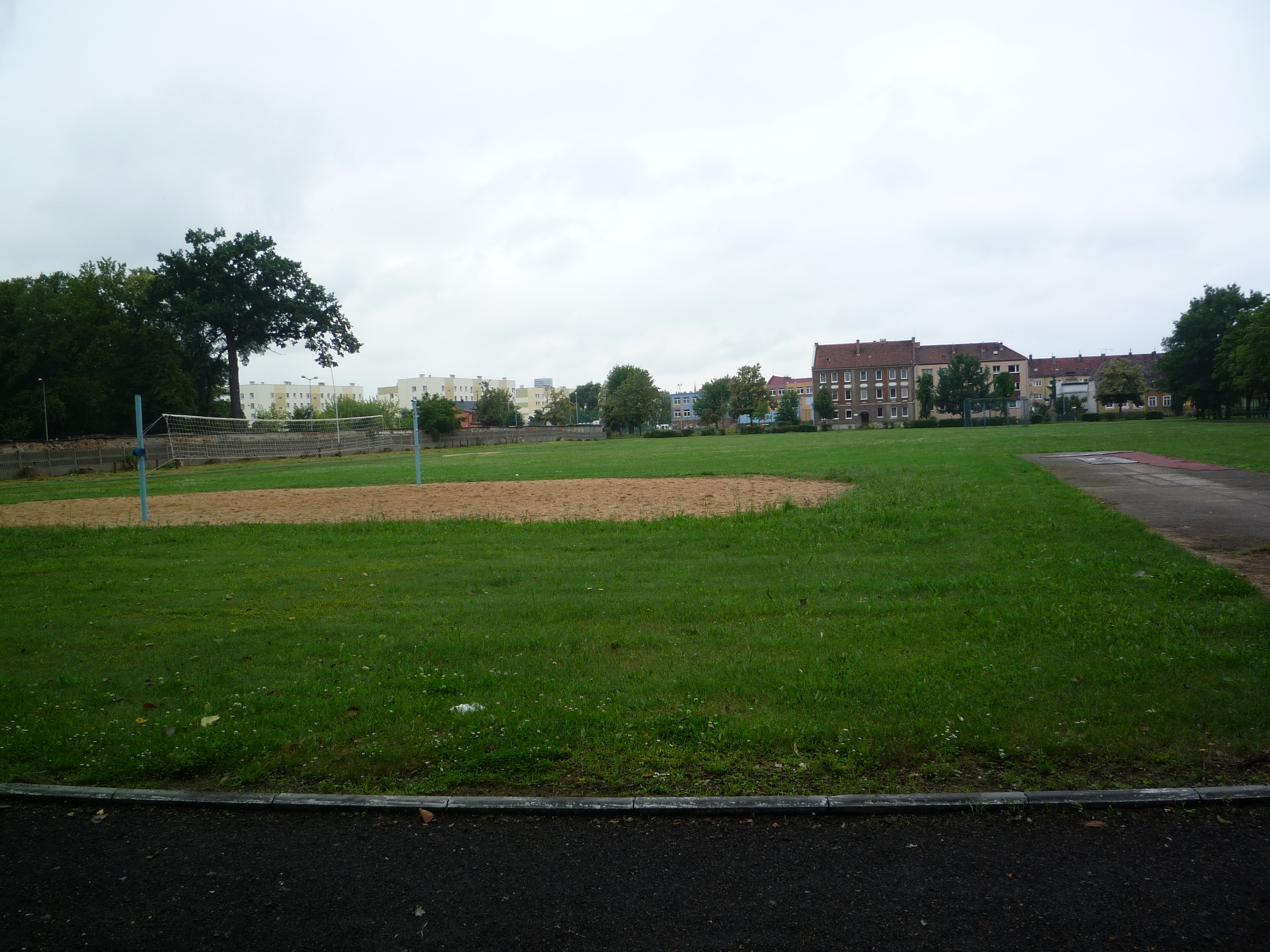 Boisko Zespołu Szkół Ekonomiczno-Rolniczych przy al. Niepodległości w Słubicach. W tle osiedle Kochanowskiego.